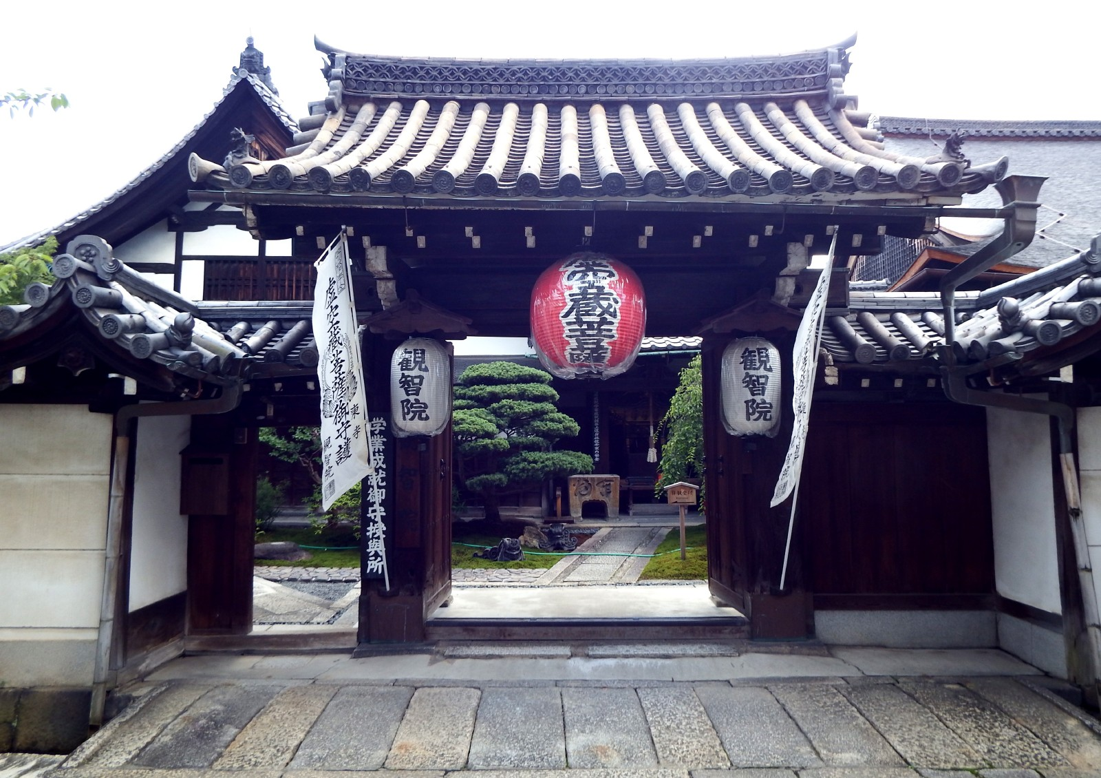 東寺の塔頭の観智院